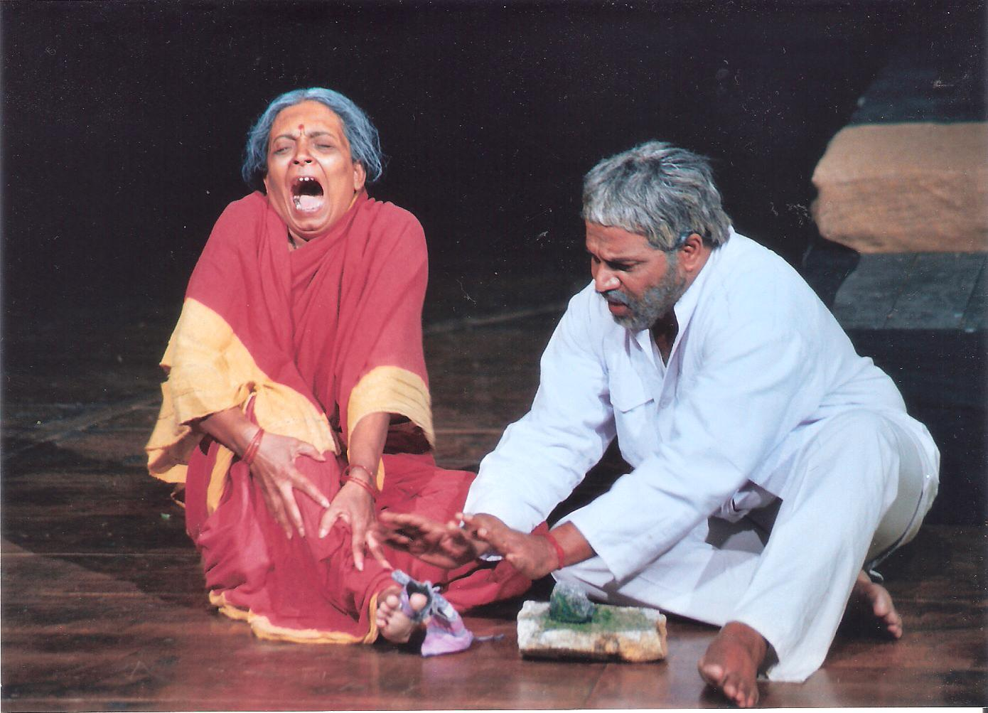 ಕನ್ನಡ: Kalpana Naganath with T.S. Nagabharana in kannada play `Tabarana Kathe'Director: R. Nagesh